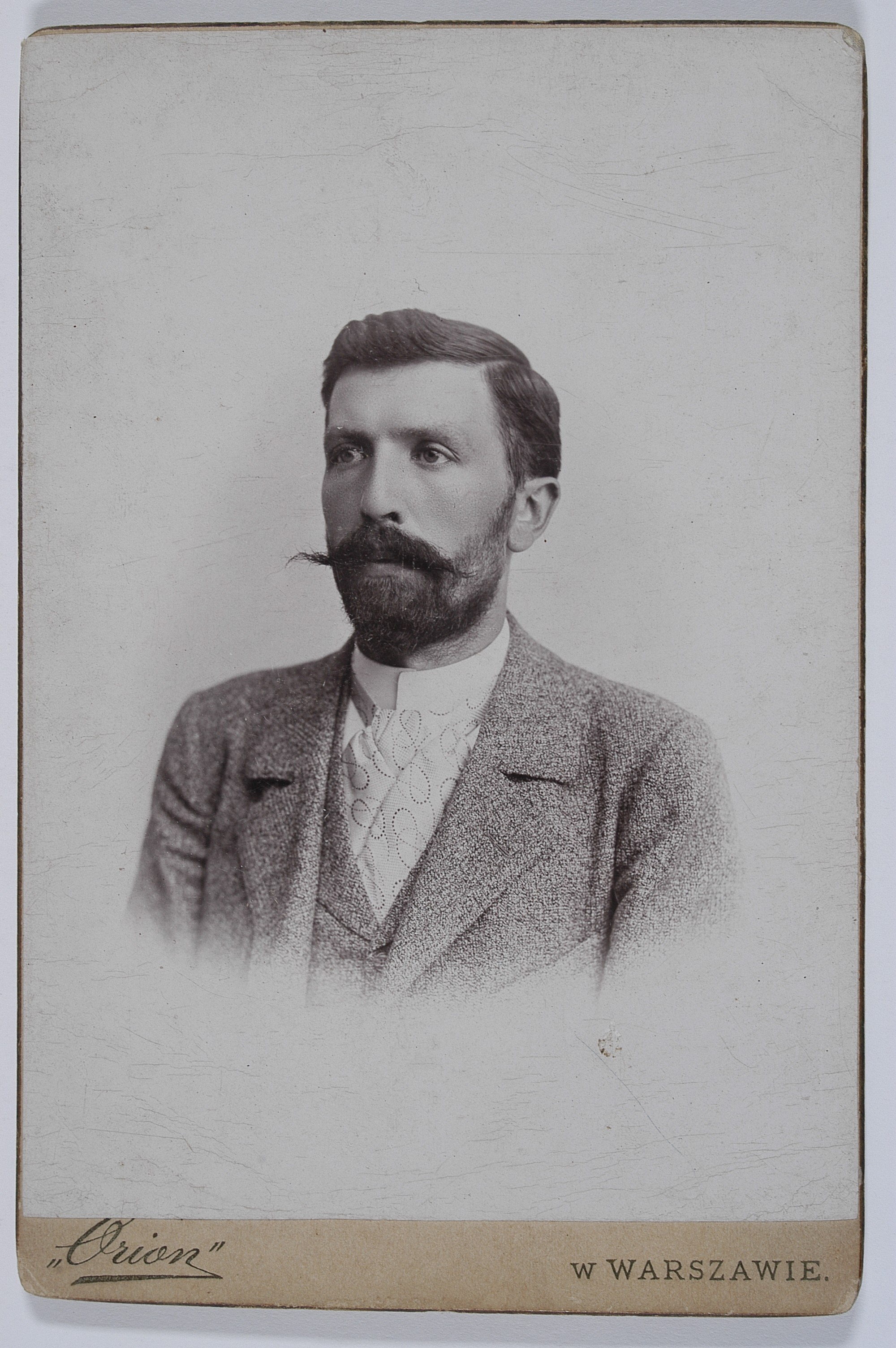 Wiktor Biernacki, ok. 1895 r.